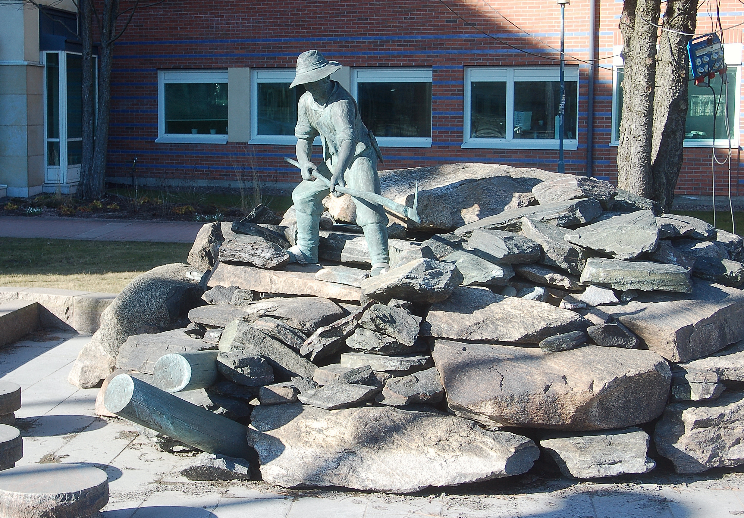 Flottaren är ett konstverk av Solveig Nyqvist placerad utanför NWT i Karlstad 2001.